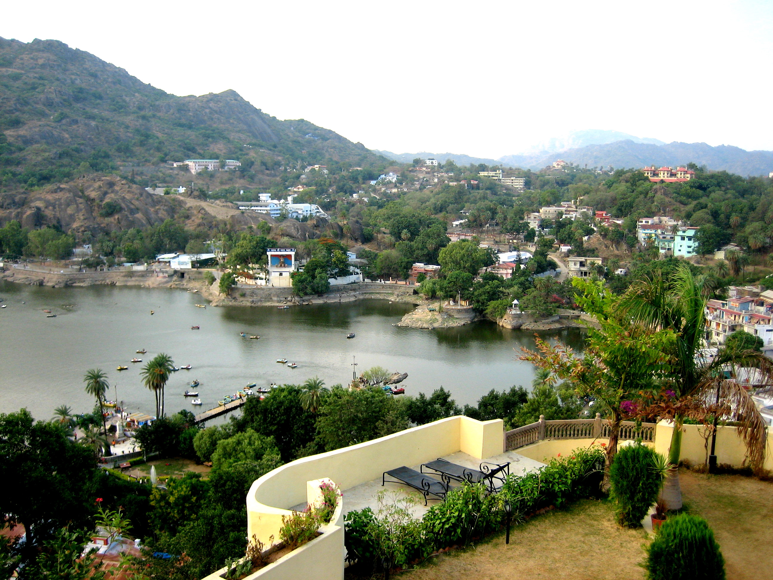 Nakki-See in Mount Abu